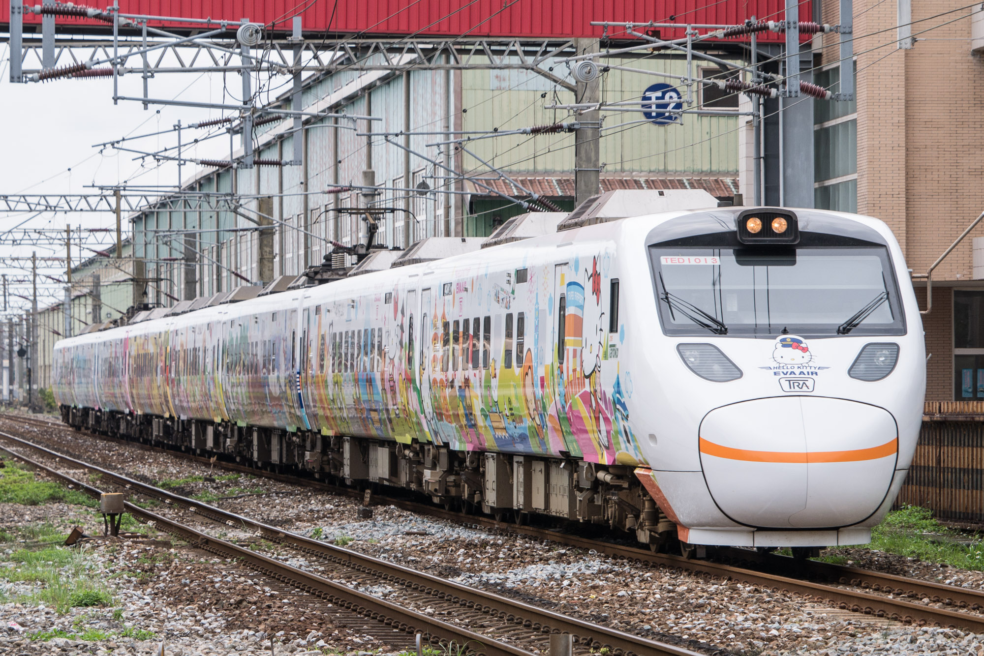 第 217 車次太魯閣號（TEMU1000）逆行北迴線，Hello Kitty 彩繪列車